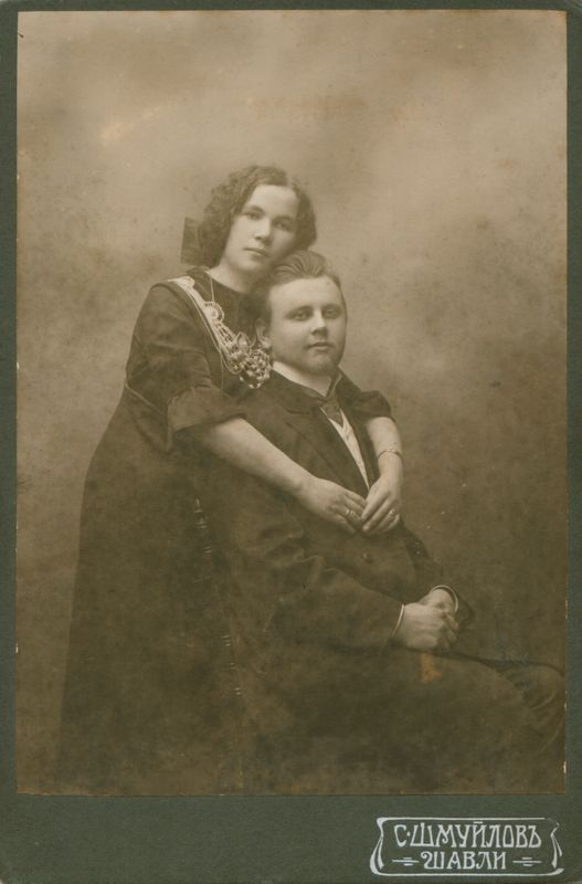 Balys Žygelis (1886 m. gruodžio 22 d., senuoju stiliumi sausio 3 d. Libertavos dvare, Balninkų valsčius – 1972 m. liepos 26 d. Kaune) – Lietuvos pedagogas, kooperatininkas, politinis bei visuomenės veikėjas.